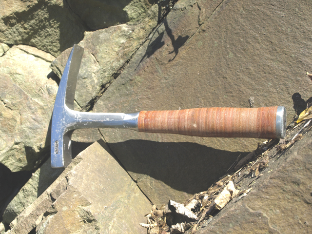 Geologenhammer mit Schneide in Ganzstahlausführung und Ledergriff